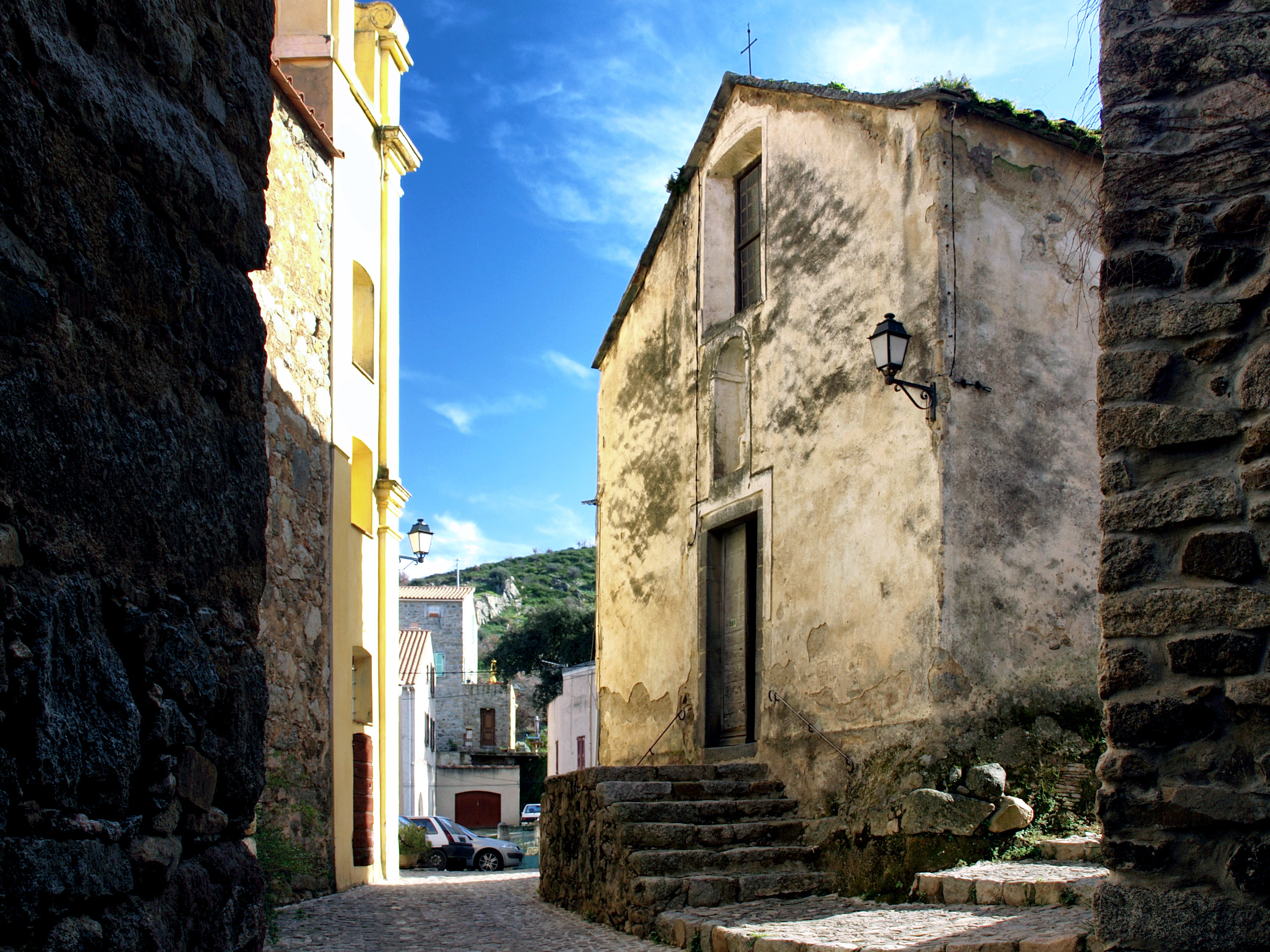 Cateri, Balagne (Haute-Corse) - La chapelle de la confrérie Sainte-Croix (casazza Santa Croce), voisine de l'église paroissiale.